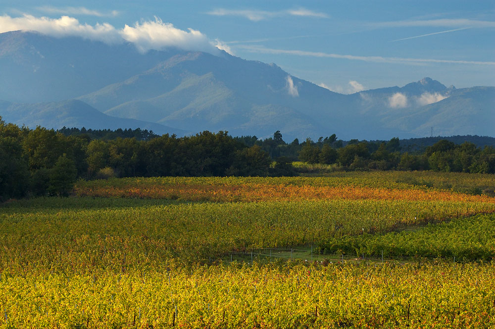 Vinyard nr Perpignan, Languedoc region, France 2006